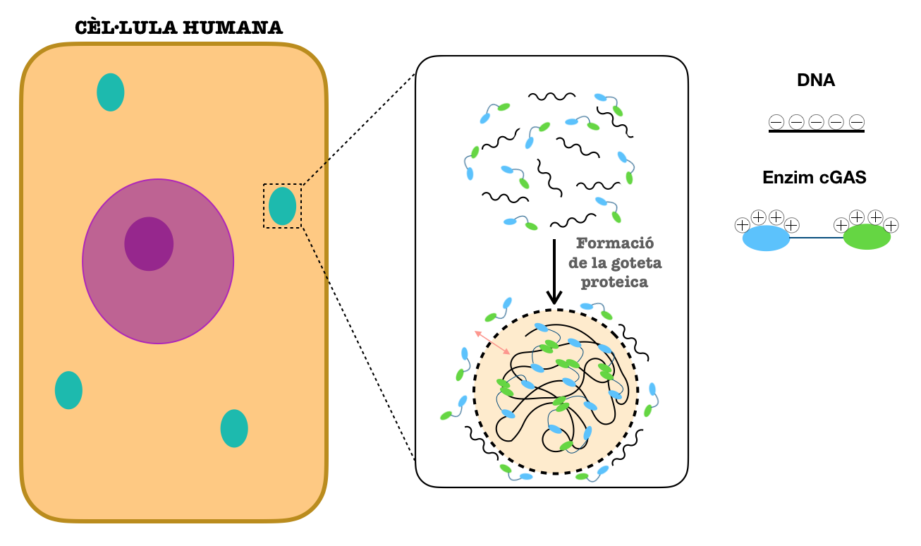 Aquesta imatge mostra de forma esquemàtica com es formen al citoplasma les gotetes proteiques a partir de molècules de DNA i de l'enzim cGAS. En un principi els dos components es troben a prop però no junts fins que finalment interaccionen i es forma la goteta proteica. Com mostra la llegenda, el DNA té càrrega negativa i es representa amb una línia negra mentre que les molècules de cGAS tenen càrrega positiva i es representen amb dues subunitats (una blava i l'altra verda) unides per una línia blava.